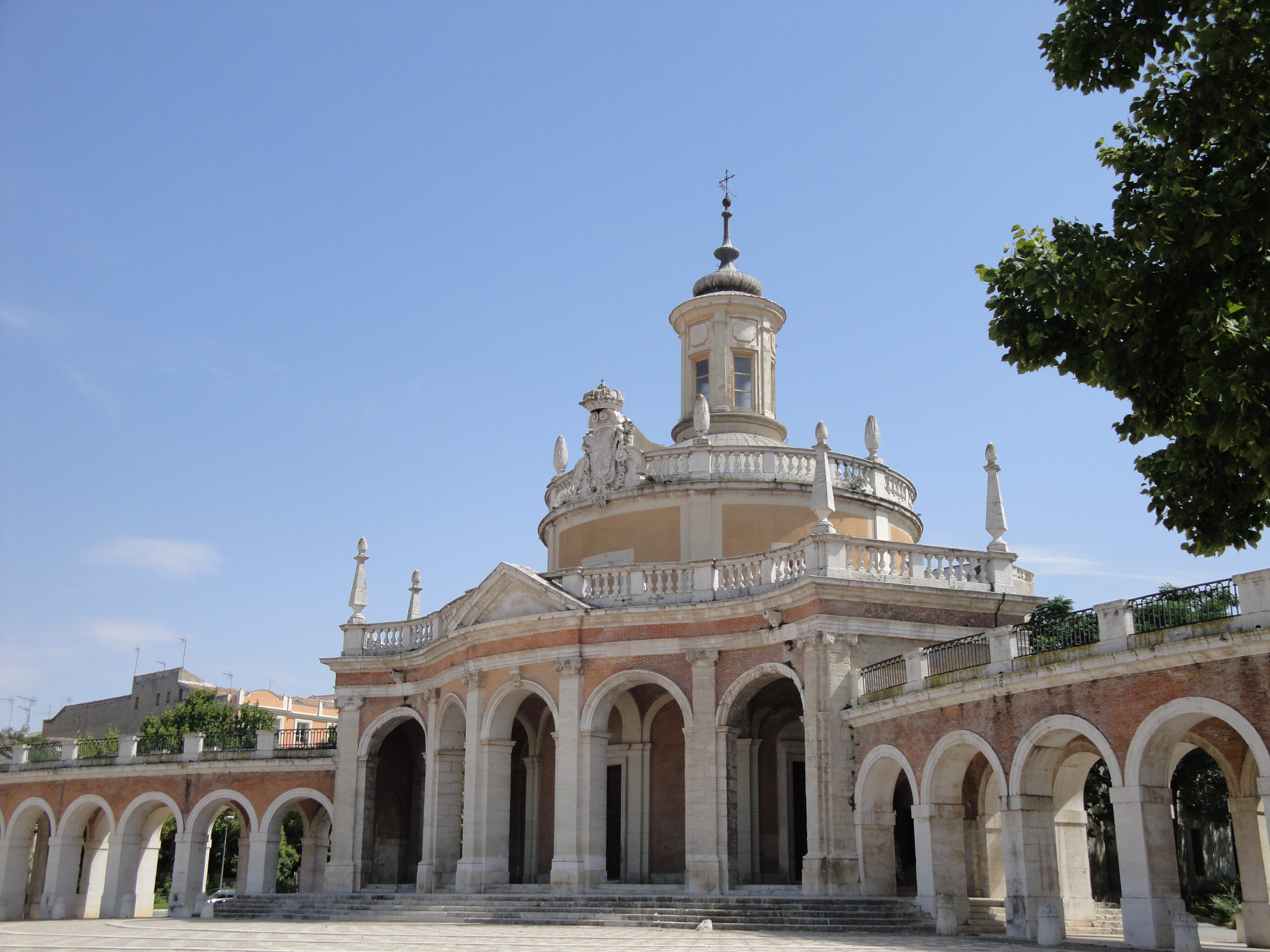 Iglesia de San Antonio en Aranjuez